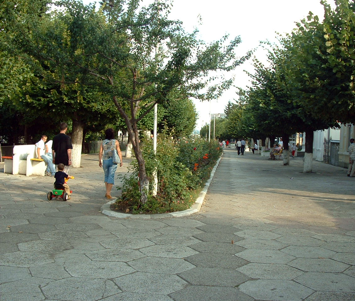 Promenada din Fălticeni